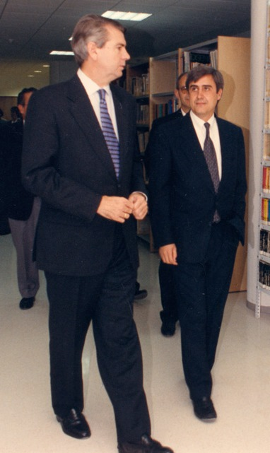 Santiago Lanzuela y juan Jose Badiola